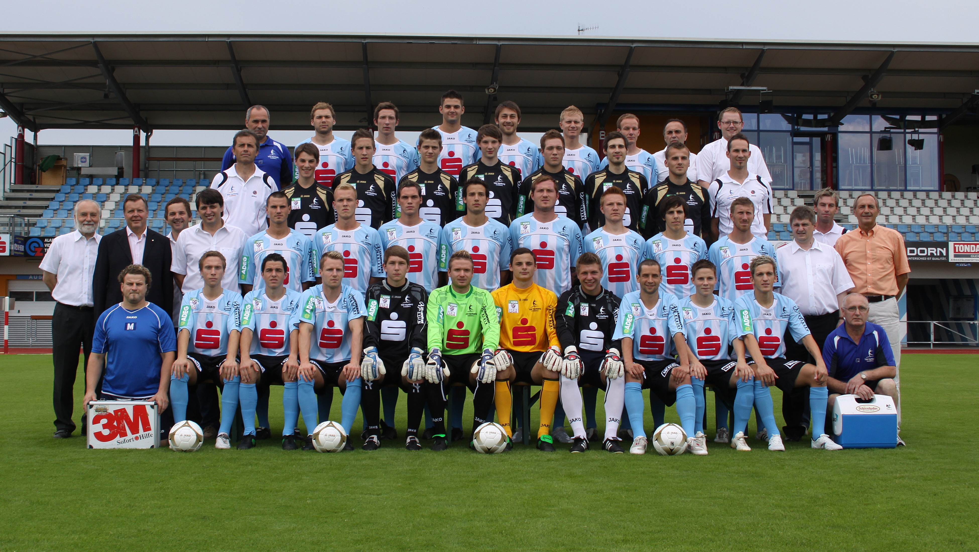 Mannschaftsfoto 2009/10 des TSV Hartberg - österreichischer Fußballverein in der Ersten Liga (Bild 2)